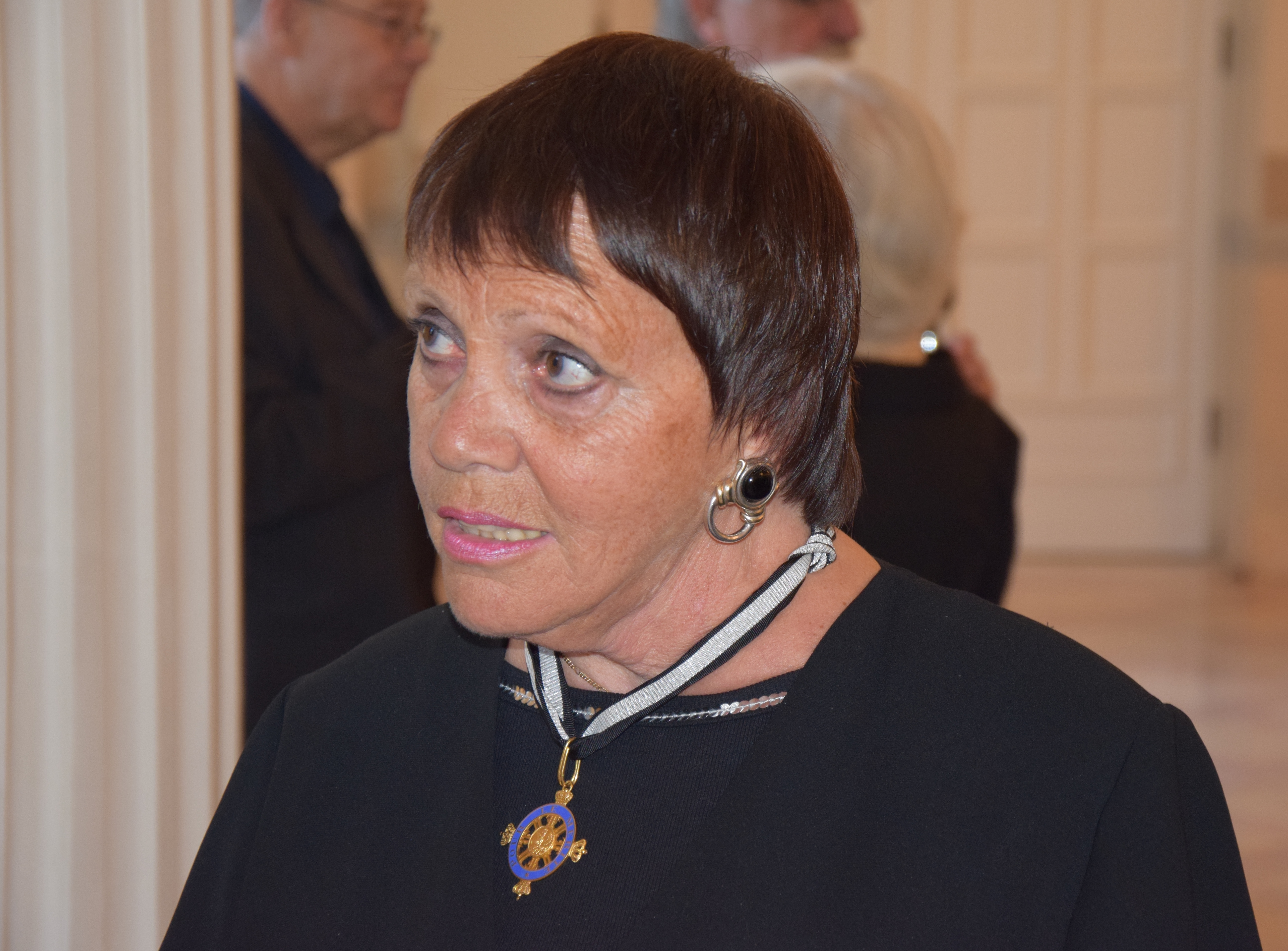 Öffentliche Sitzung der Mitglieder des Ordens Pour le mérite für Wissenschaften und Künste 2014 im Konzerthaus am Gendarmenmarkt in Berlin